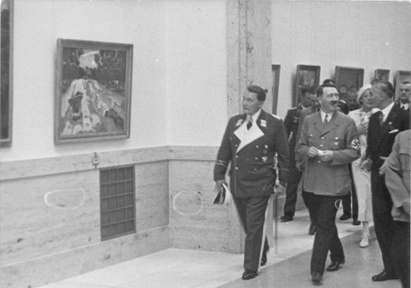 "Tag der Deutschen Kunst" in München. Der Führer beim Rundgang durch die Ausstellung. Der Führer im Gespräch mit Prof. Ziegler, links Generaloberst Göring. Fot. Mü